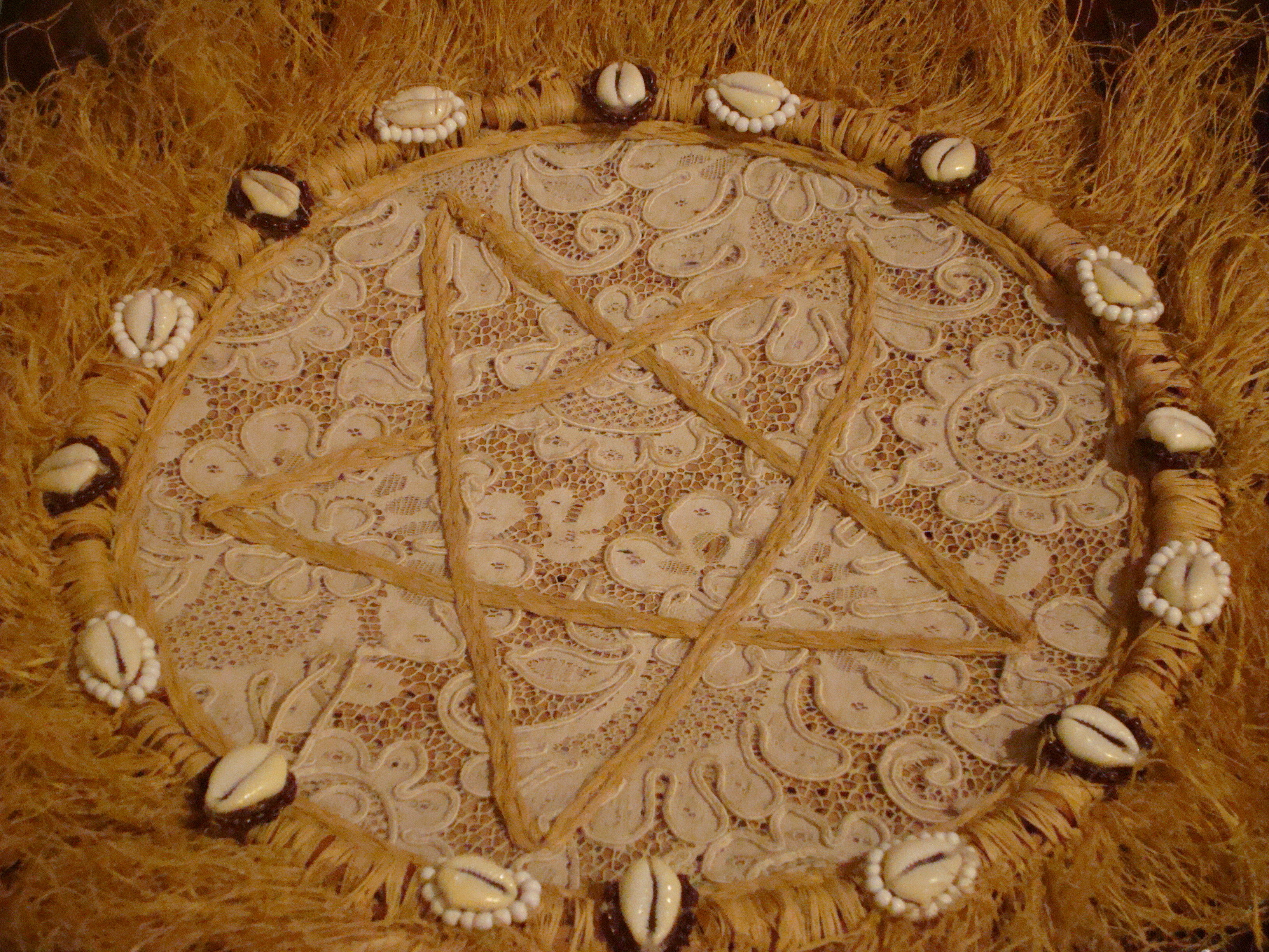 Opon Meridilogun Orossi